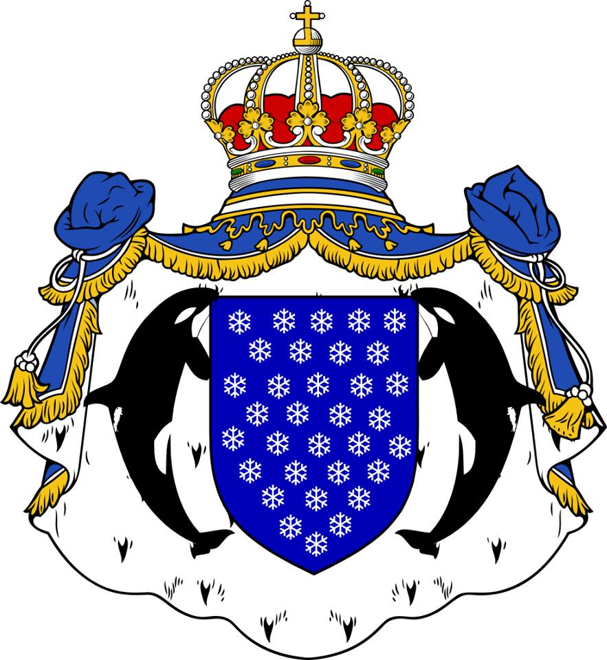 Il s'agit du drapeau actuel de la micronation de la Westarctique, situé en Terre Marie Byrd sur le continent Antarctique. Westarctica a eu de nombreux drapeaux depuis sa fondation en 2001, mais c'est actuellement le drapeau officiel approuvé par le gouvernement.